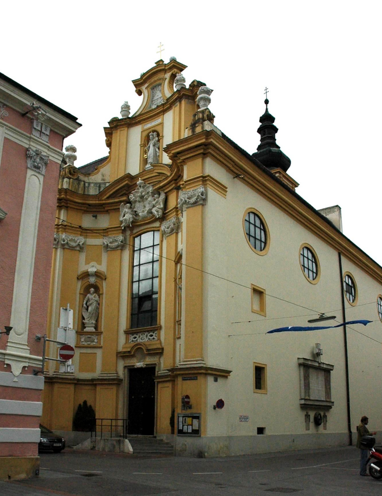 St. Pölten 036 St. Pölten, Lower Austria